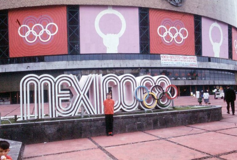 Aquellas sangrientas �pocas de M�xico 68. Mi papa ah� era a�n un chamaco. Comentario que deber�a ir aqui: Asi es, muy lamentable que la mente paranoide del tirano diaz ordaz, presidente de aquel M�xico 1968, diera instrucciones de cegar la vida de los "...estudiantes revoltosos... comunistas... quieren destruir a M�xico... sovi�ticos y cubanos agitadores... manos extra�as...muerto el perro se acab� la rabia..." 2 de octubre no se olvida. Los juegos ol�mpicos fueron inaugurados por el tirano el 12 de octubre de 1968 Esta foto ser� aprox de septiembre de ese a�o, es en la explanada del Auditorio Nacional, sede de la gimnasia ol�mpica; �recuerdan a Vera Chavlavska? checoslovaca campeona olimpica y reina de la olimpiada quien se ech� a la bolsa a todos los mexicanos al utilizar de fondo musical en su manos libres el jarabe tapat�o y contraer nupcias tambien en el DF aprovechando su estancia en la olimpiada. En esas �pocas las gimnastas eran mas bien regordetas y a�osas, comparadas con las jovencisimas s�lfides de hoy, aunque Natasha Kushinskaya de la URSS iniciaba tambien en el 68 la era de las j�venes ol�mpicas. Ahora no existe ni Checoslovaquia ni la URSS, ni las regordetas... Recuerdos encontrados; tristemente celebre el octubre de 1968 en la ciudad de M�xico. El mundo es otro; somos testigos de cambios dr�sticos en las sociedades, en las maneras de ser, en los deportes, en todo.